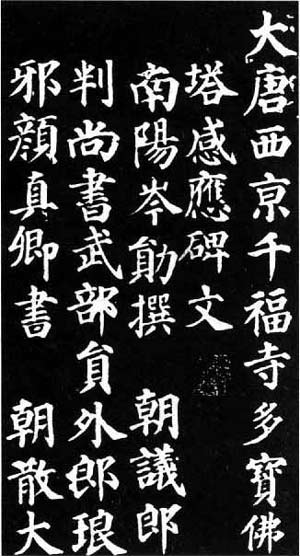 顏真卿楷書《多宝塔碑》，全稱《大唐西京千福寺多寶塔感應碑文》。其書法字體與現行繁體字/正體字有所不同。